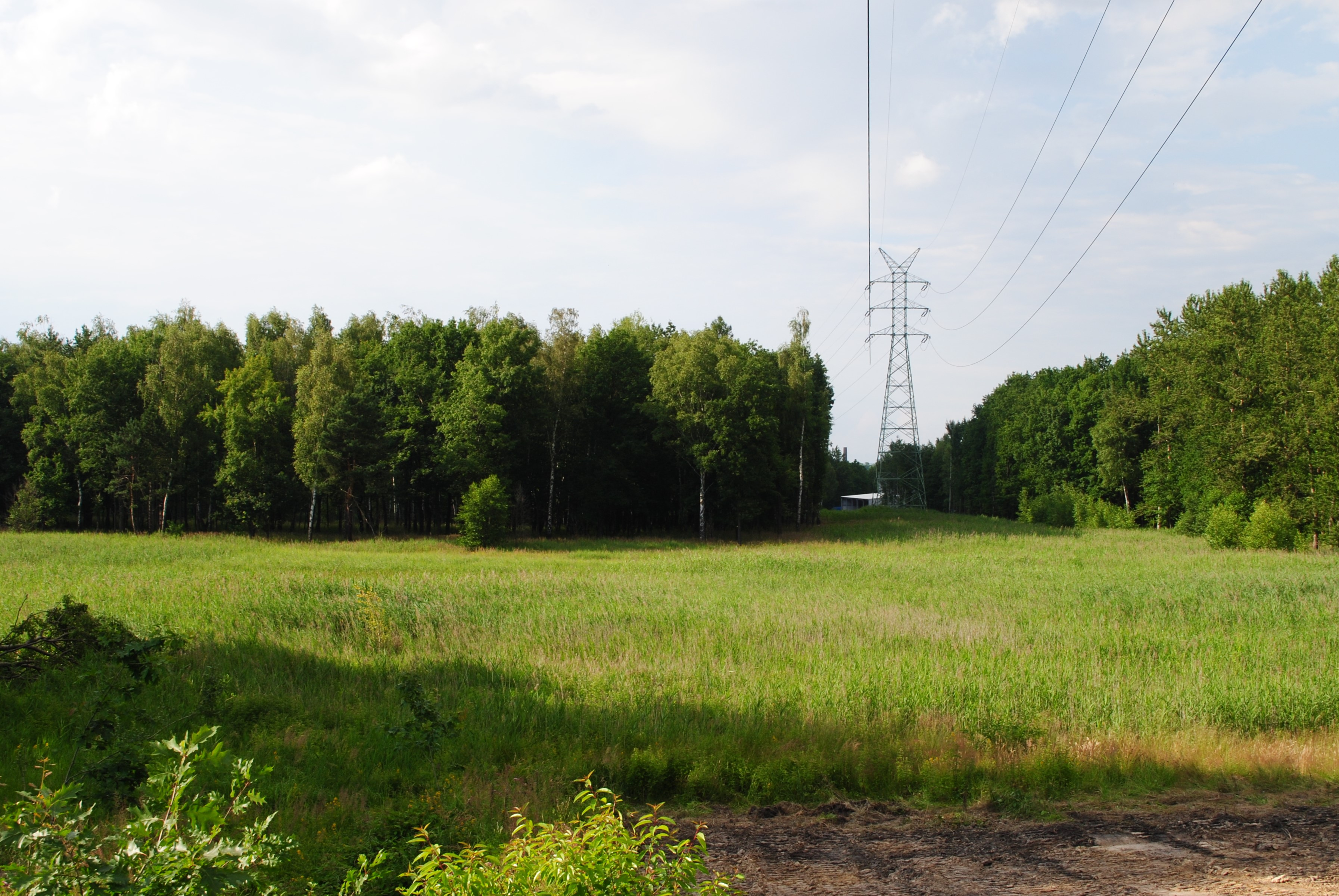 Katowice - Janów-Nikiszowiec. Tereny podmokłe w pobliżu osiedla Nowy Nikiszowiec